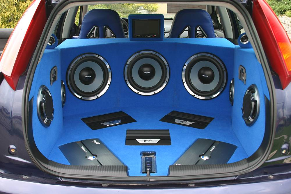 Peiying_demo_car